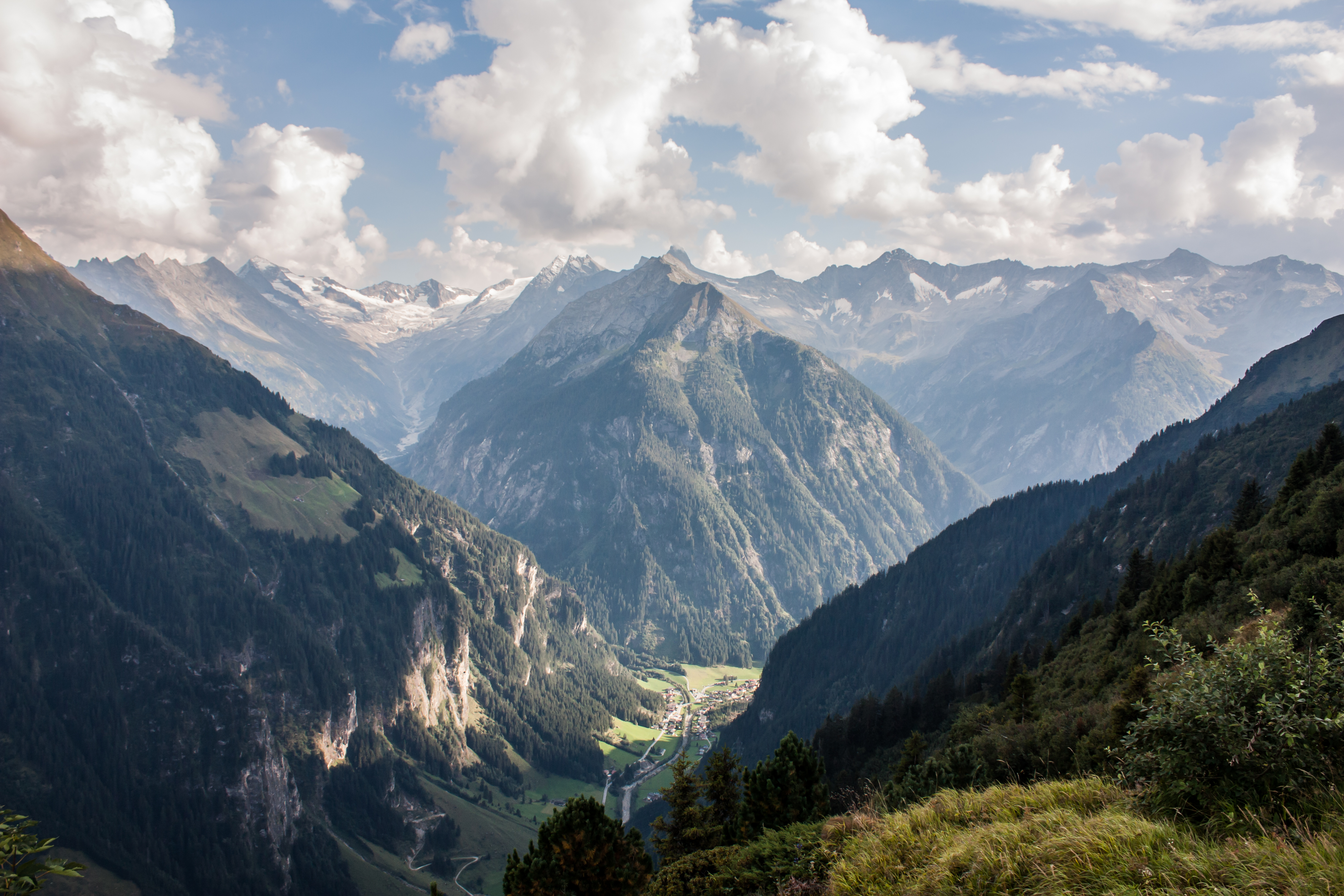 Zillertaler Alpen, Blick von Gamshütte auf Gaulkopf, Lappin und dahinter liegende Berge This file shows the Nature Park with the ID 7109 in Austria.